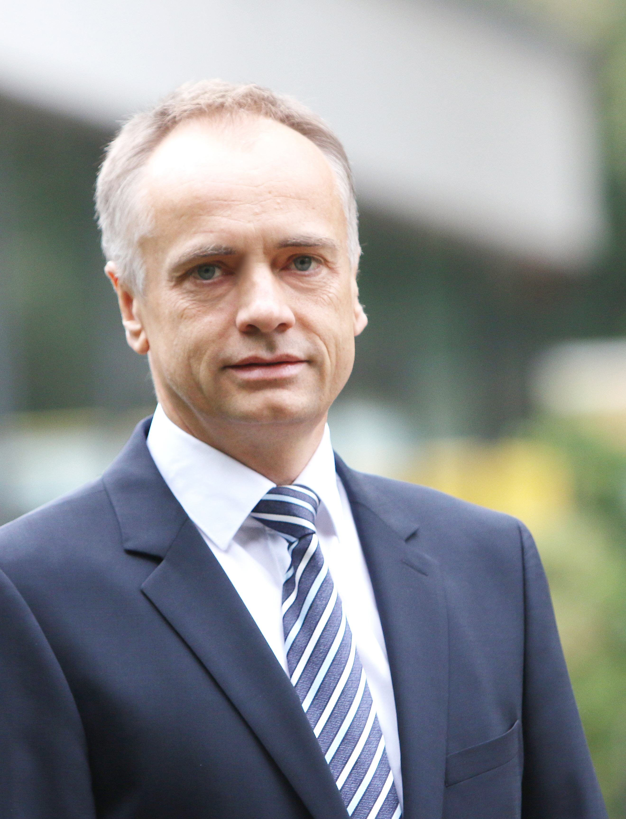 Univ.-Prof. Dr. Heiko K. Strüder, Rektor der Deutschen Sporthochschule Köln